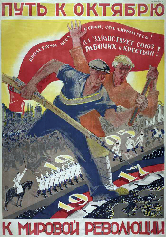 Плакат "Путь к октябрю, к мировой революции"